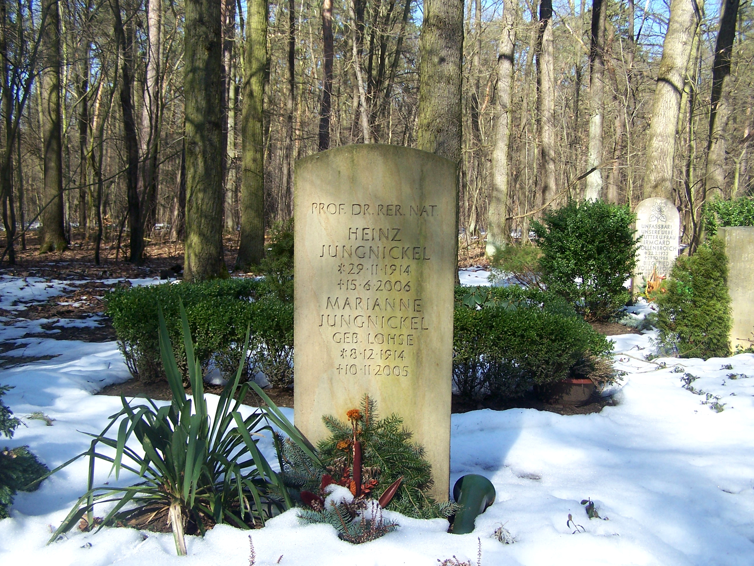 Grab von Heinz Jungnickel auf dem Heidefriedhof zu Dresden